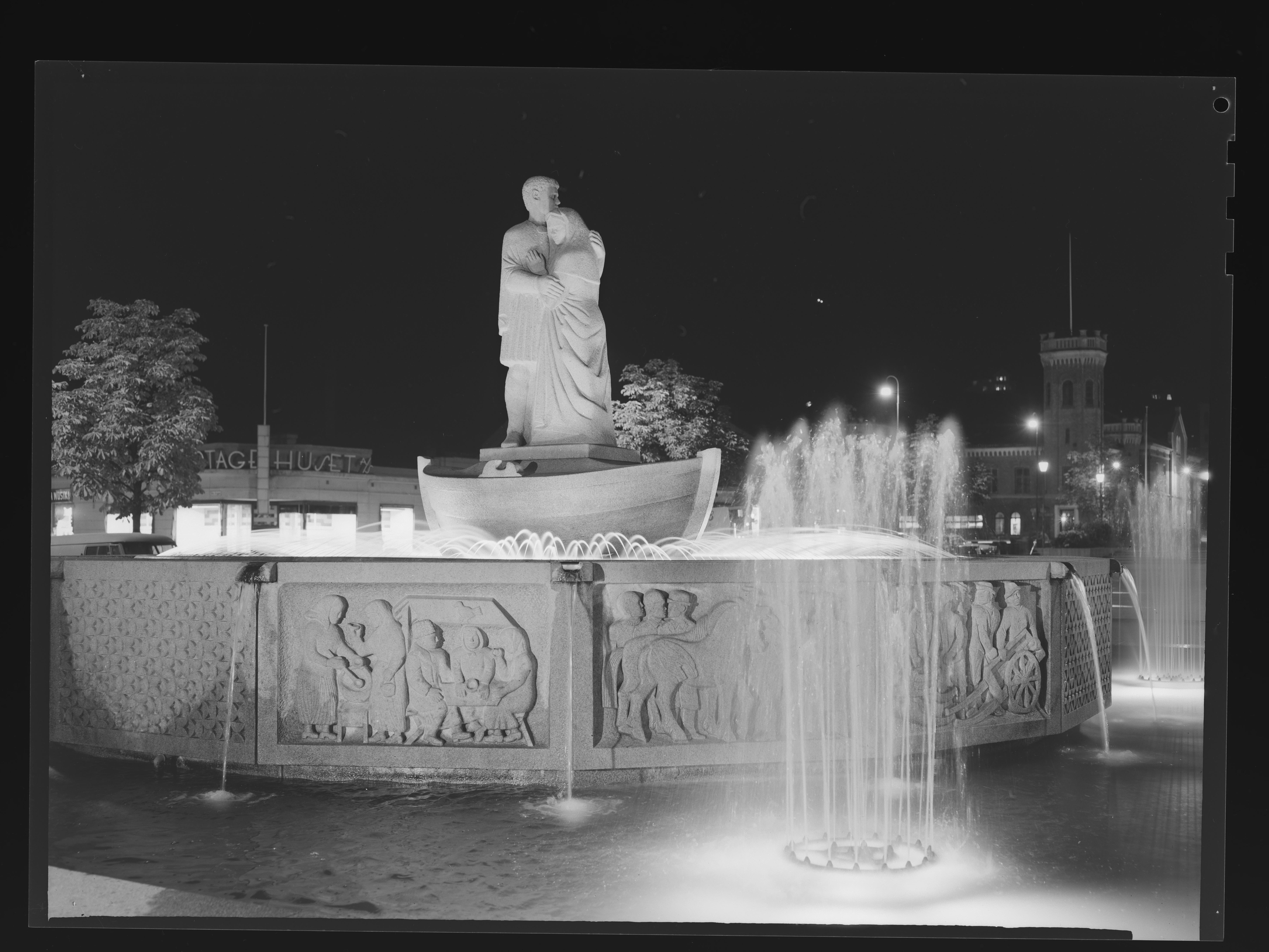 Bildet er hentet fra Nasjonalbibliotekets bildesamling. Anmerkninger til bildet var: Katalog nr. 72 Drammen, Drammen, Buskerud